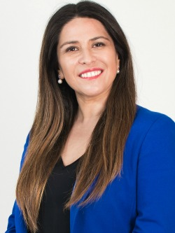 Jenny Álvarez Vera en la fotografía oficial de diputados periodo 2018-2022. (Fotos: Christel Andler, René Lescornez, Johanna Zárate)